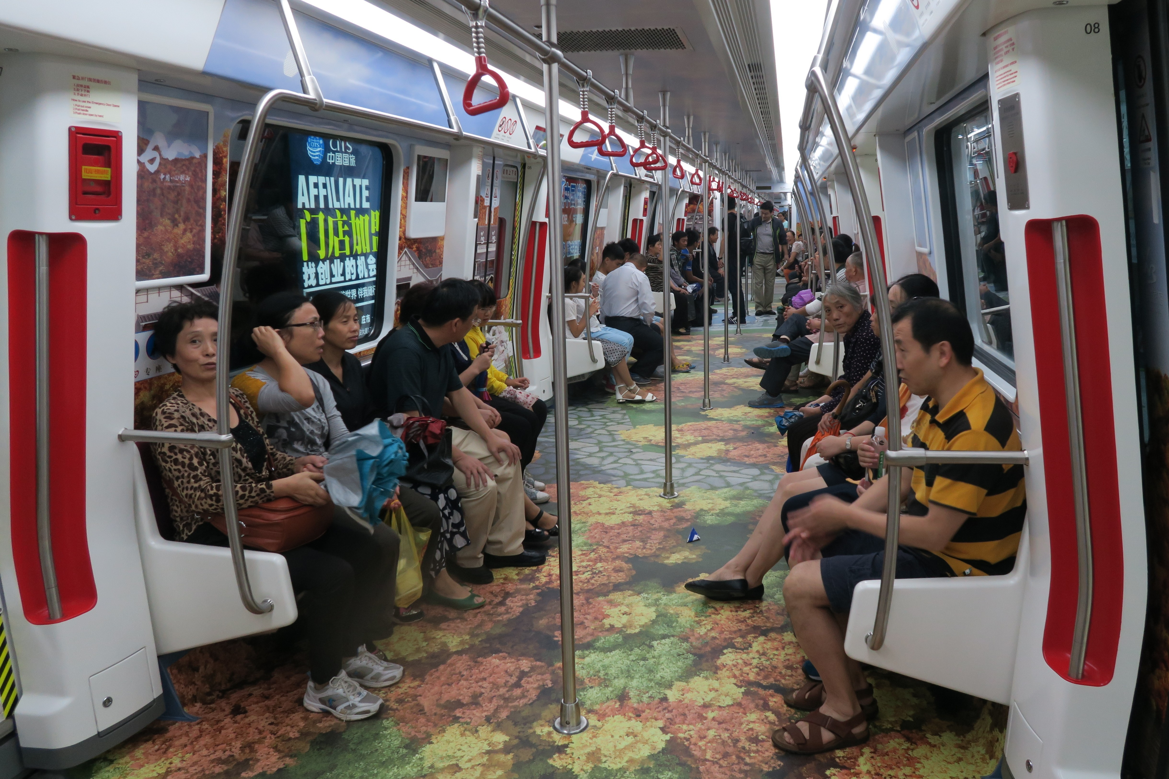 宁波轨道交通2号线四明山文化专列内